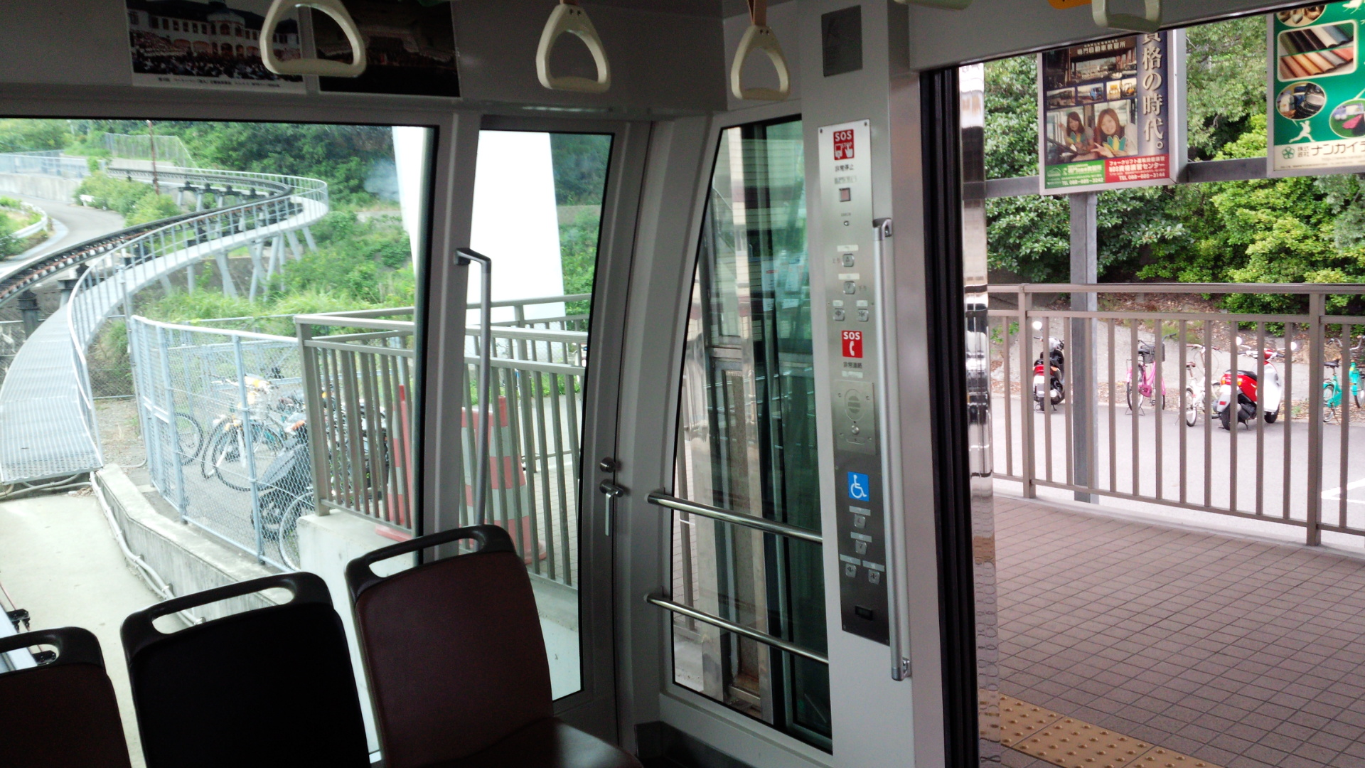 鳴門市にある「すろっぴー」２代目の室内操作ボタン